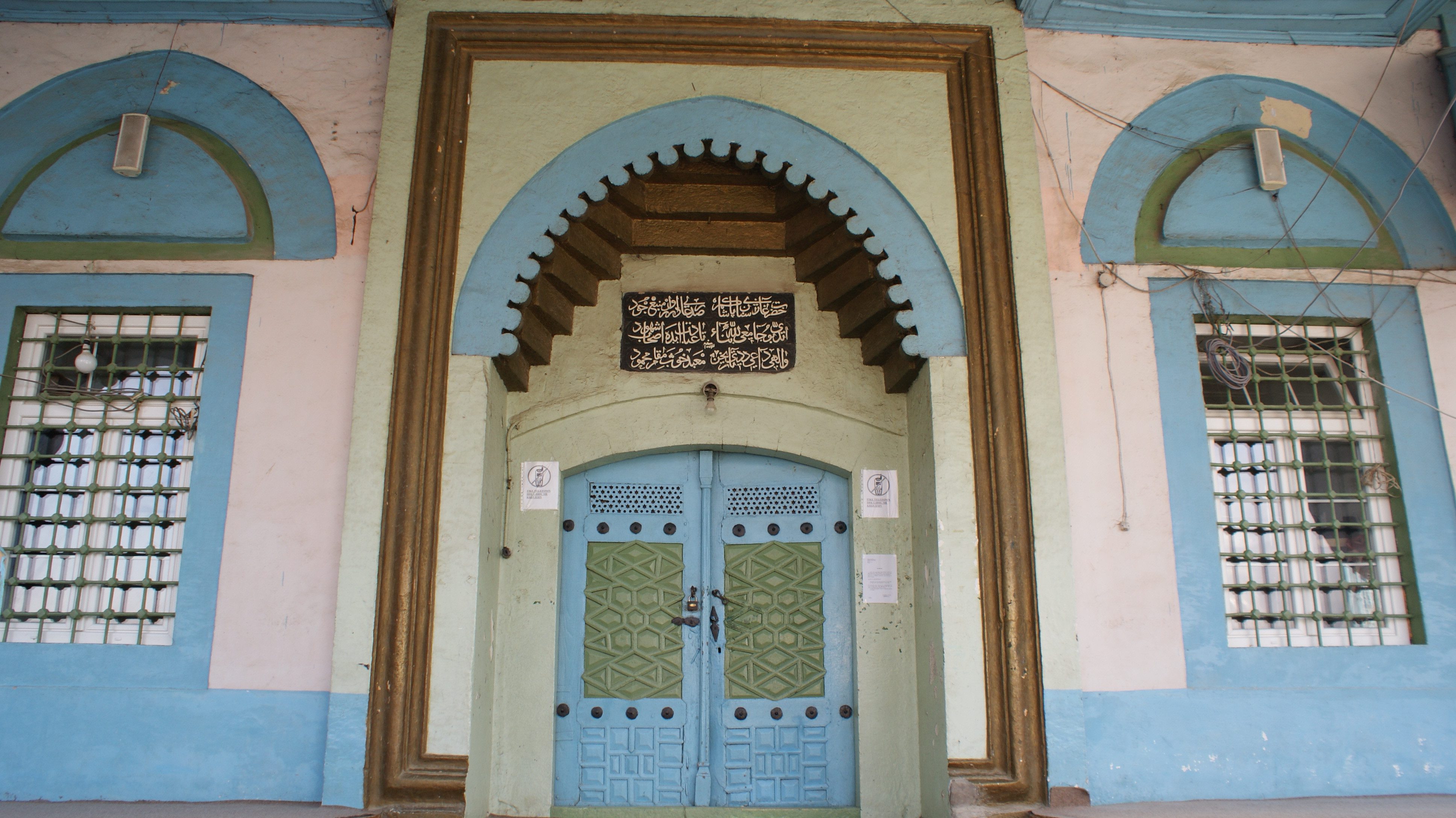 Xhamia e Sinan Pashës